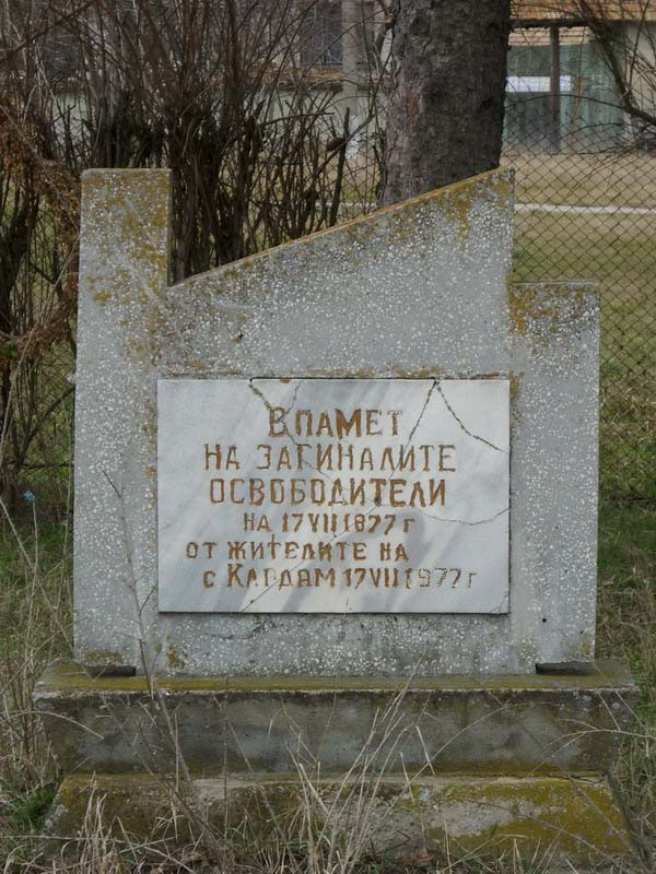 Село Кардам, община Попово. Паметникът на руските войни, поставен на 100-годишнината от Освобождението на селото